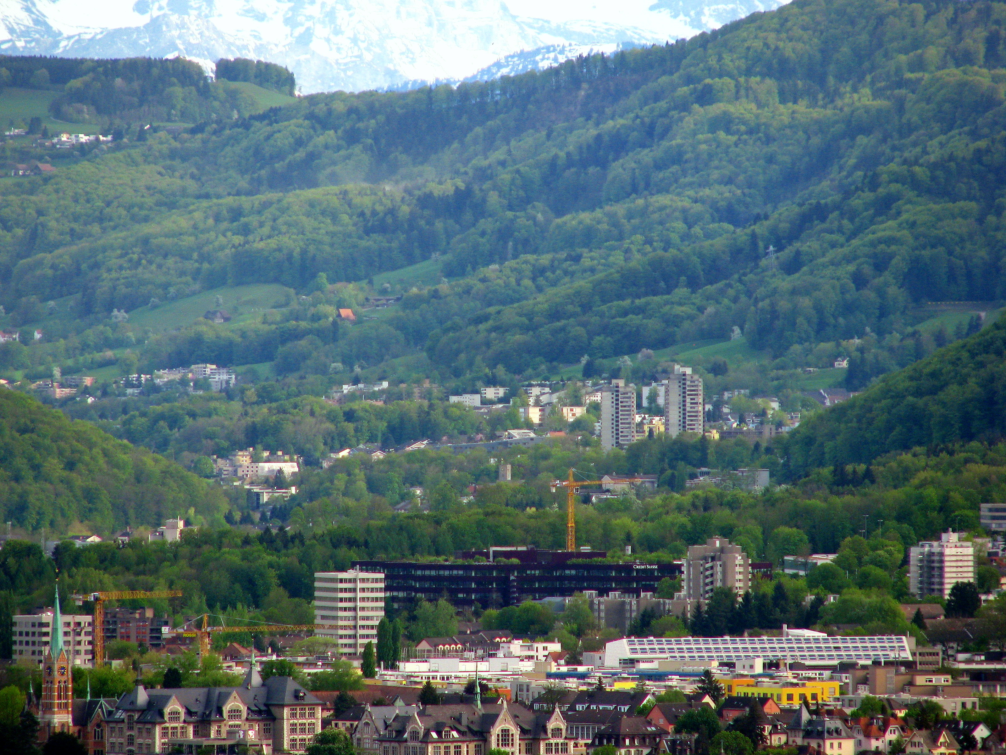 Zürich-Leimbach, lower Sihltal and Albis hills as seen from Käferberg-Waidberg